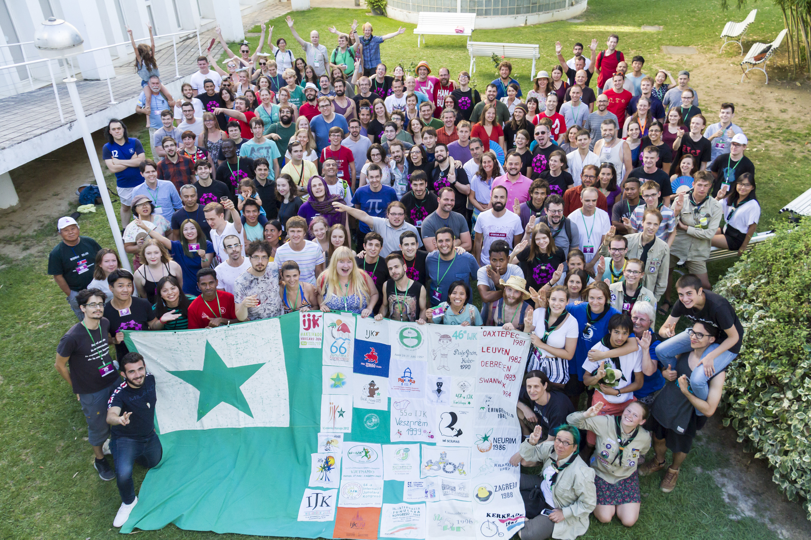 Grupfoto de IJK 2018